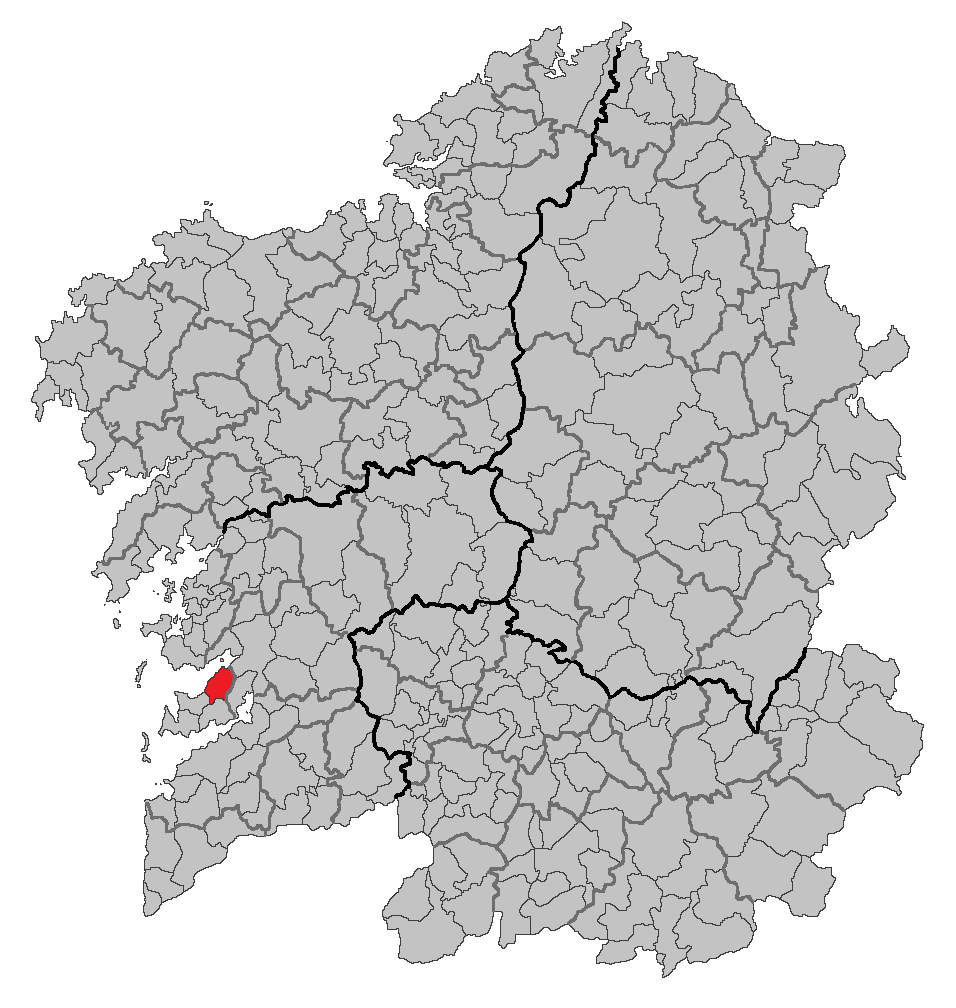 Mapa coa localización do concello de Marín.